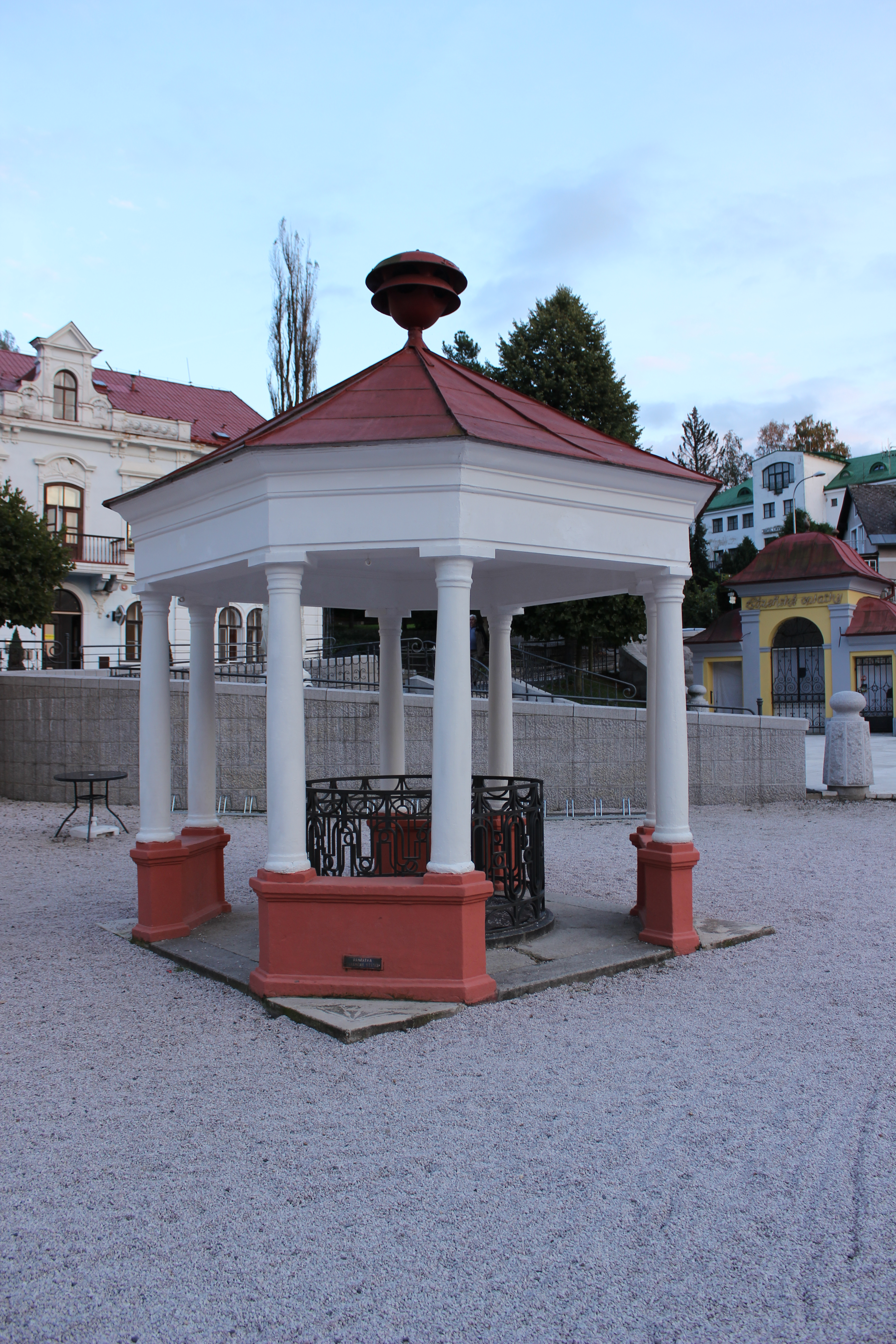 Gloriet Mariánského zřídla na kolonádě v Lázních Libverdě.